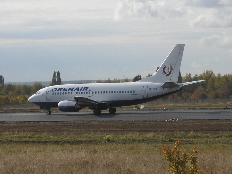 Boeing 737-500 авиакомпании "Оренбургские авиалинии" в Белгороде